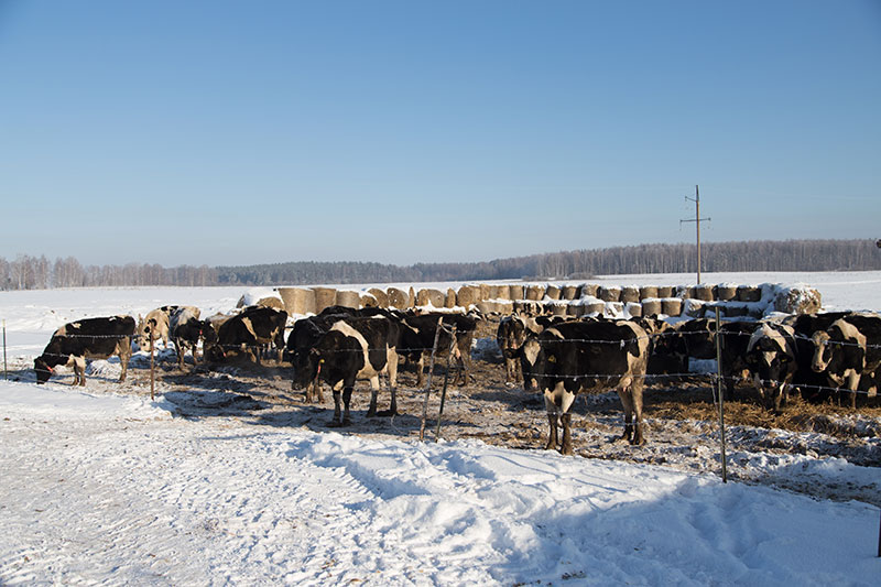 Роботизированная ферма Саяпина, Мосальский район Калужской области